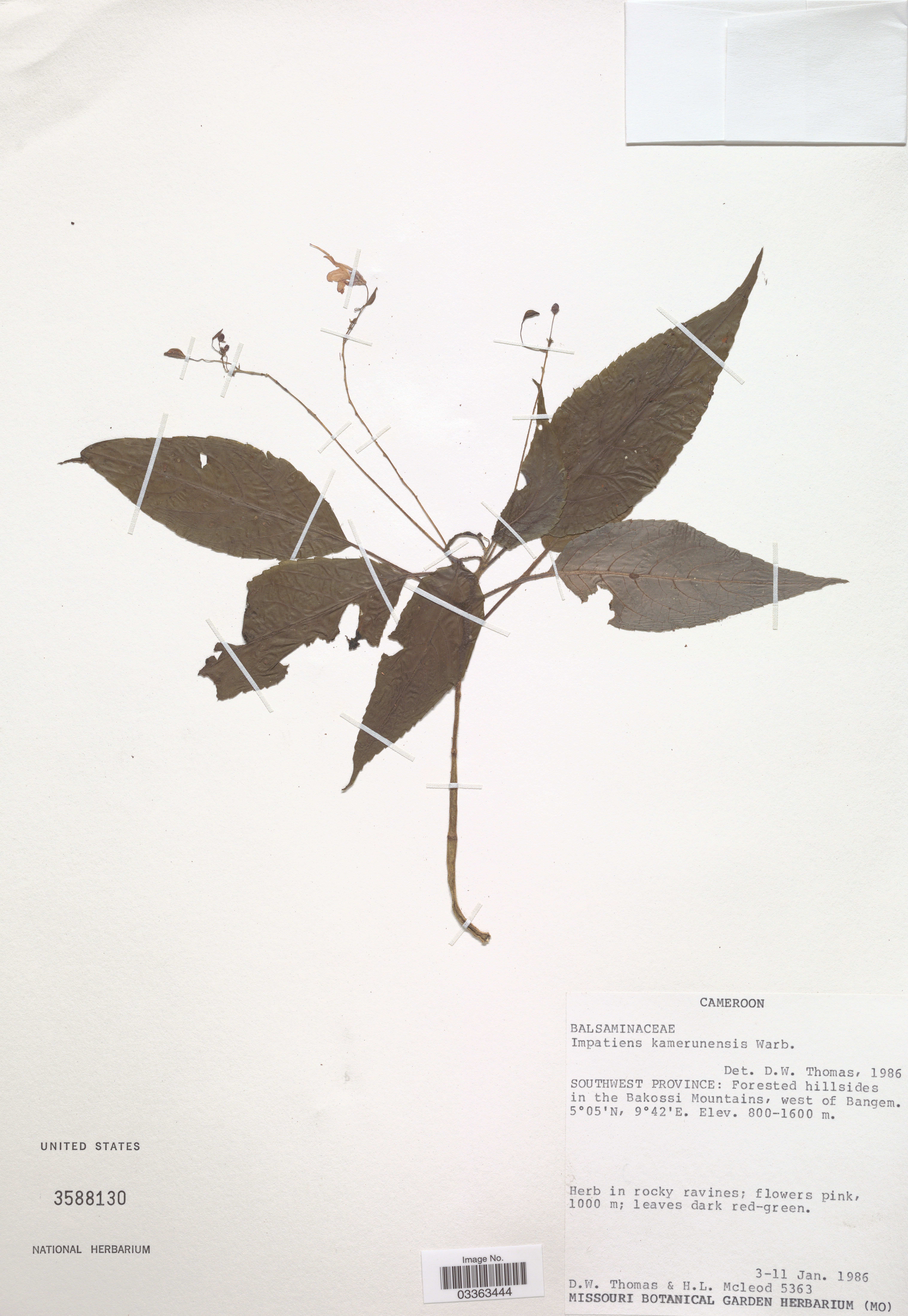 Impatiens kamerunensis Warb. Object Details Record Last Modified 10 Jul 2019 Specimen Count 1 Collection Date 3 Jan 1986 to 11 Jan 1986 Barcode 03363444 USNM Number 3588130 Biogeographical Region 23 - West-Central Tropical Africa Collector Duncan W. Thomas H. L. Mcleod Max. Elevation 1600 Min. Elevation 800 Place Southwest Province: Forested hillsides in the Bakossi Mountains, west of Bangem., Sud-Ouest, Cameroon, Africa Published Name Impatiens kamerunensis Warb. Taxonomy Plantae Dicotyledonae Geraniales Balsaminaceae NMNH - Botany Dept. Record ID nmnhbotany_14876140 Metadata Usage CC0